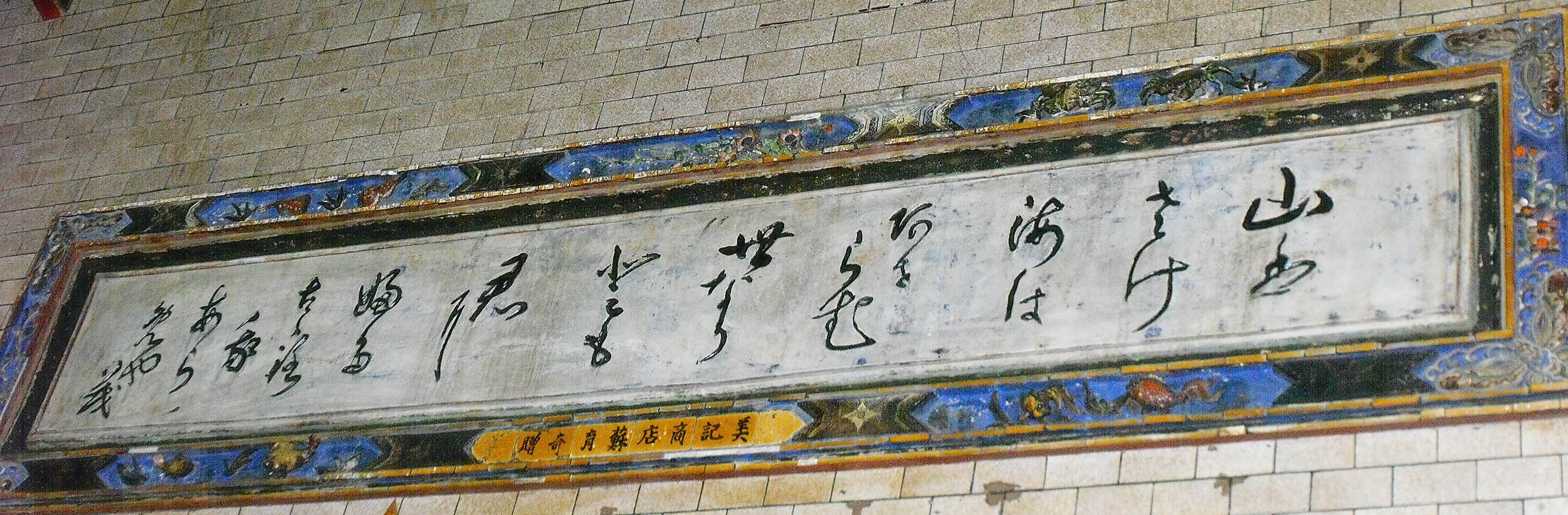 嘉邑城隍廟正殿和歌